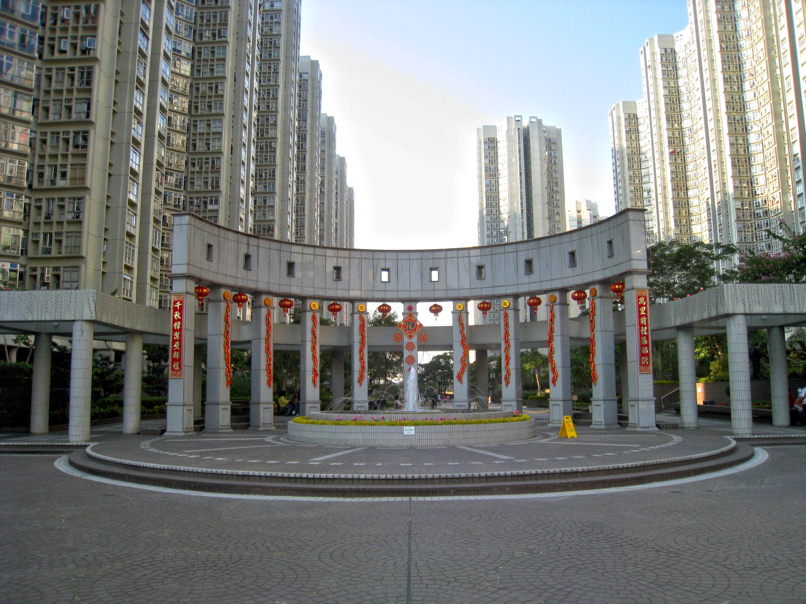 Sceneway Garden Enterance Plaza 滙景花園